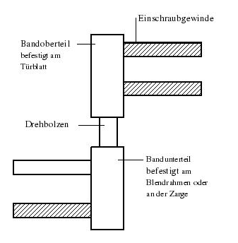 Türband (Einbohrband)